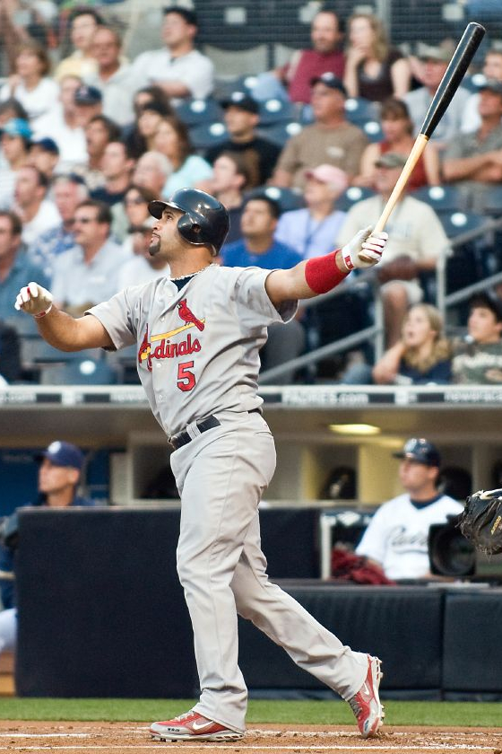 Albert Pujols